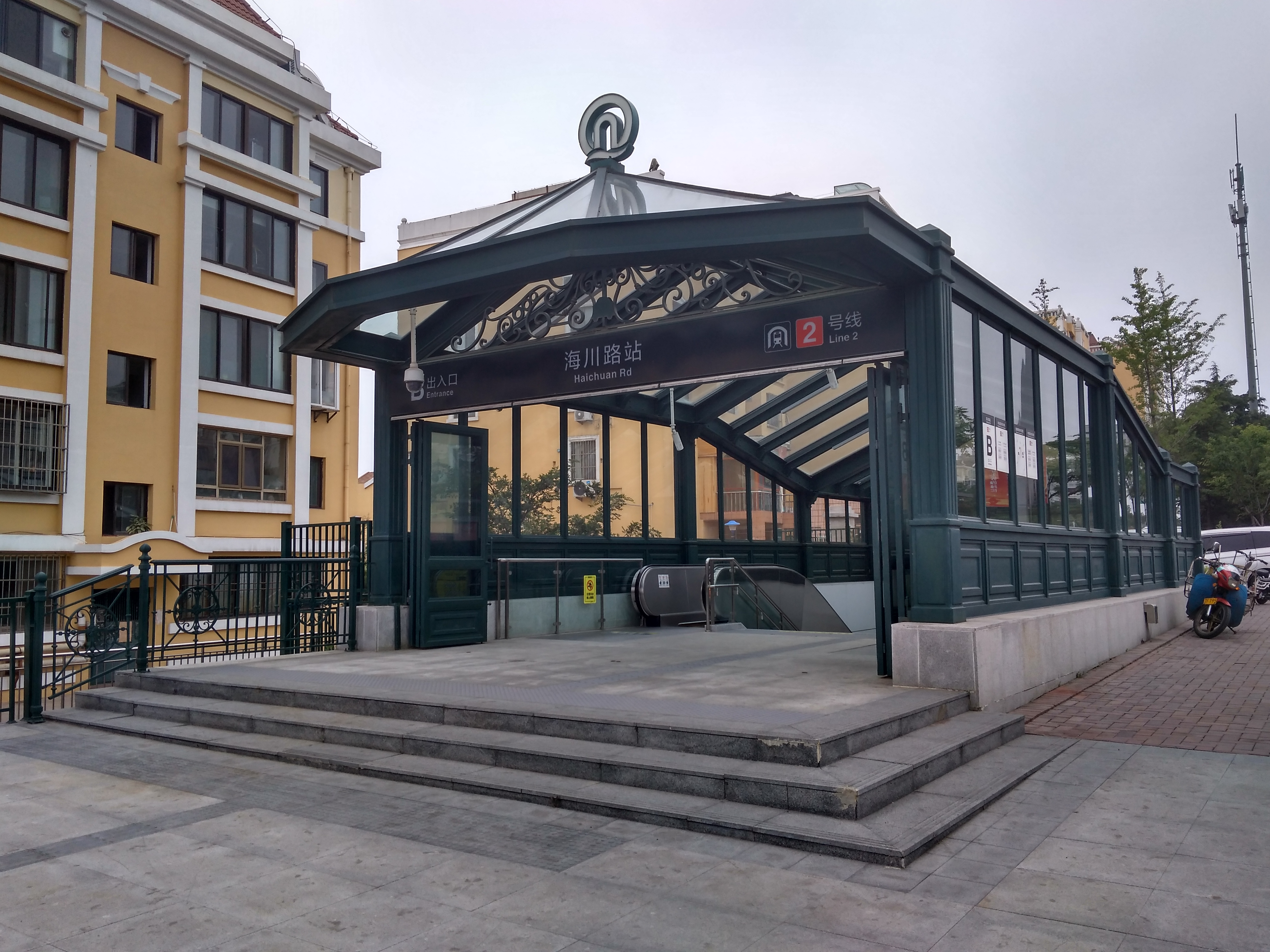 海川路站B出入口